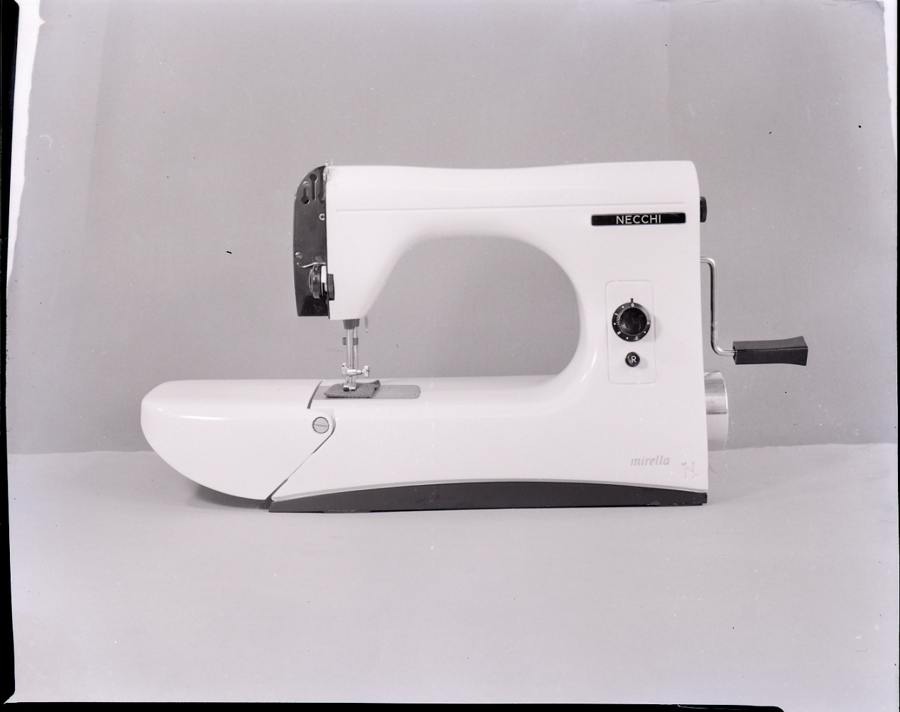 Premio LaRinascente Compasso d'Oro per l'estetica del prodotto. Oggetti partecipanti al concorso di un'edizione non identificata: sedute, abbigliamento, valige, accessori, elettrodomestici. Servizio fotografico : Milano, 1960 / Paolo Monti. - Buste: 30, Fototipi: 37 : Negativo b/n, gelatina bromuro d'argento/ pellicola ; 10x12. - ((Serie costituita da 37 negativi identificati con i nn.: 2004-2040. Numerazione parallela: 201-230. La suddetta serie è contenuta nella scatola identificata con la numerazione G1925/2042; sul coperchio iscrizione manoscritta a pennarello: "Rinascente 183/284/ Compasso/ d'oro.". - Fonte: Rubrica di Paolo Monti: Archivio 10x12 (ultimi numerati) - dal G1 al (s.d.), presso Archivio Paolo Monti